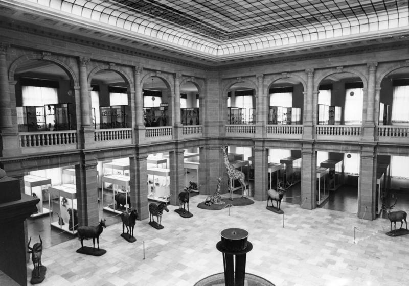 Zoologisches Museum Alexander König, Bonn Blick von der Empore in den Lichthof des Museums König, in dem eine Reihe von Großsäugetieren Aufstellung gefunden hat.